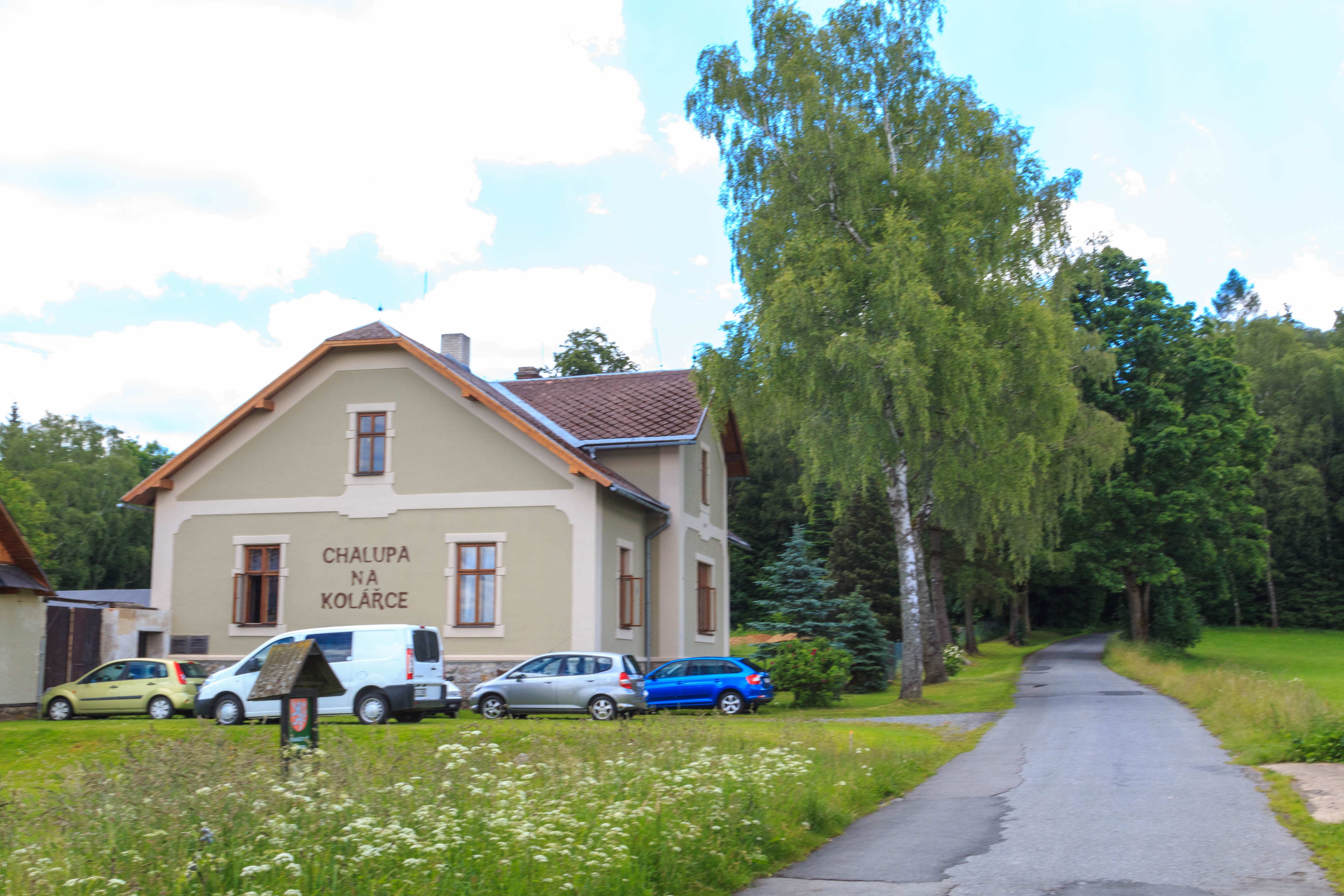 Brušovec čp. 342